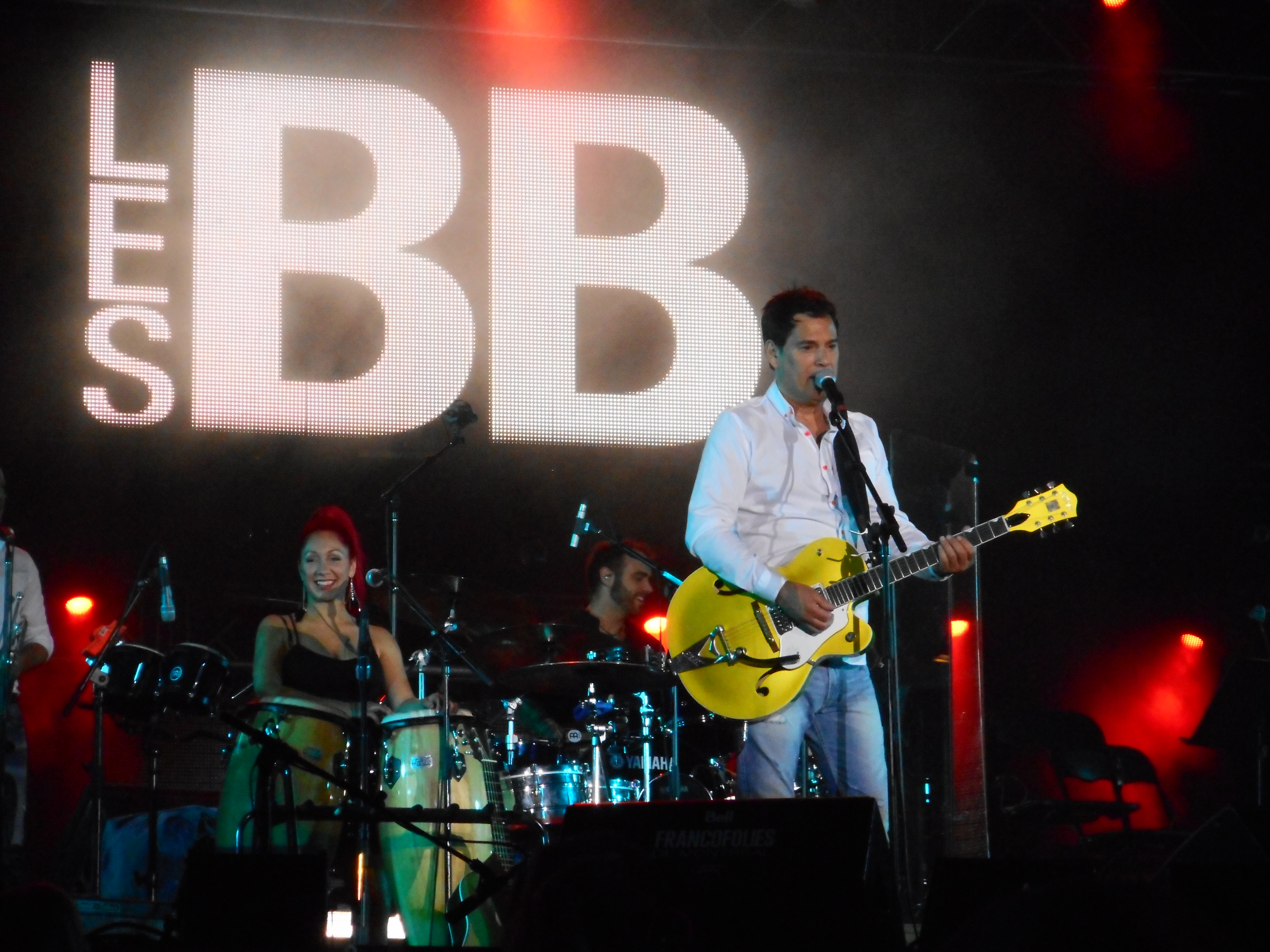 Les BB, 25 ans avec invités, à la place des Festivals, le 17 juin 2015